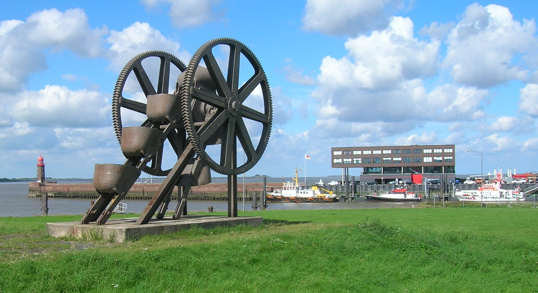 Oberes Ende (Oberturas) des 1914 erbauten Baggers I mit zwei Antriebsrädern von 4,30 m Durchmesser. Der Eimerkettenbagger hatte 40 Eimer mit 40 l Fassungsvermögen. Die Baggerleistung belief sich auf 650 m3 Schlick pro Stunde. Die Baggertiefe reichte bis 14 m. Bagger I wurde 1980 ersetzt durch Bagger Bremerhaven. – Im Hintergrund auf dem anderen Geesteufer das neue Lotsenhaus.